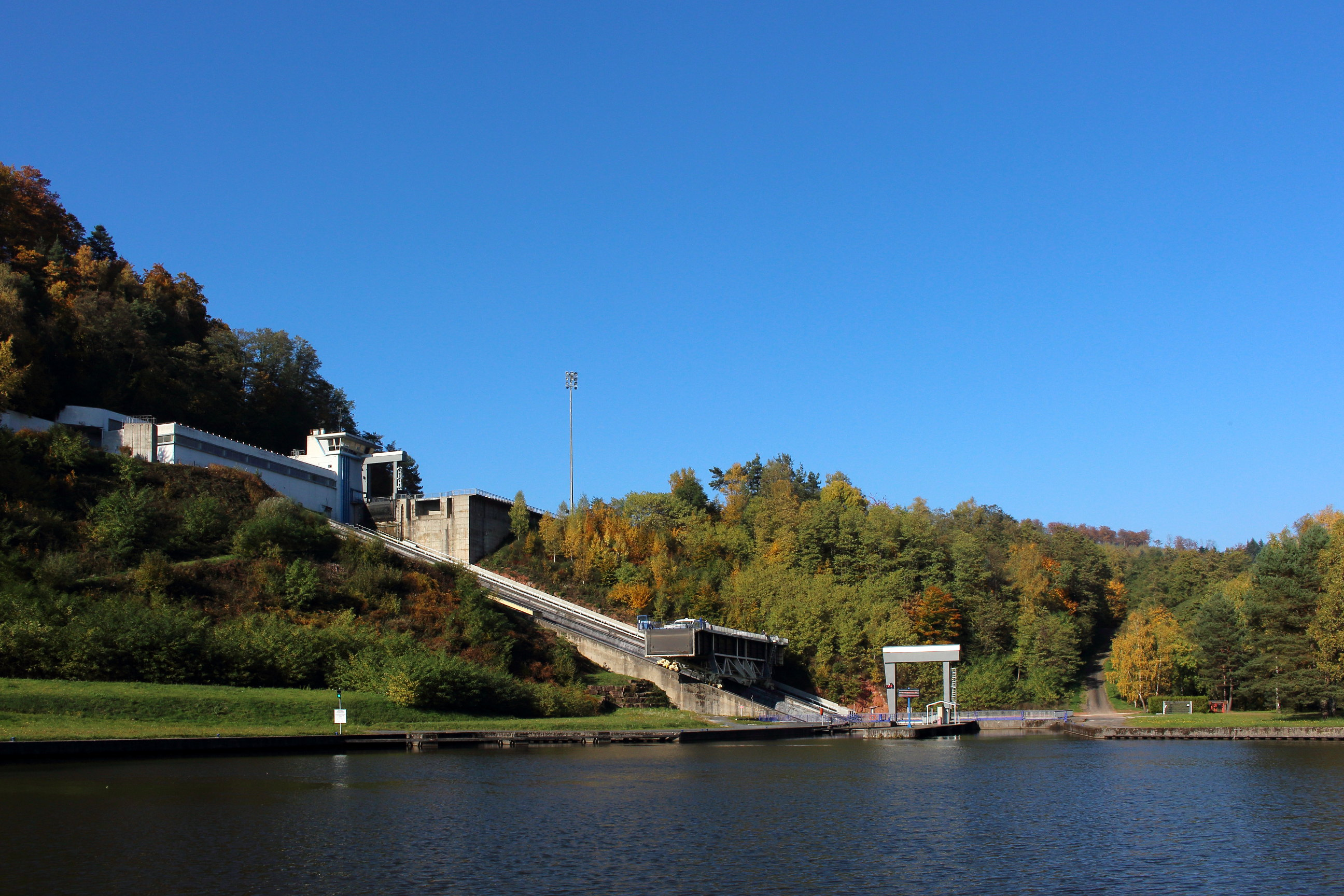 Schiffshebewerk Saint-Louis/Arzviller (Überblicksbild)